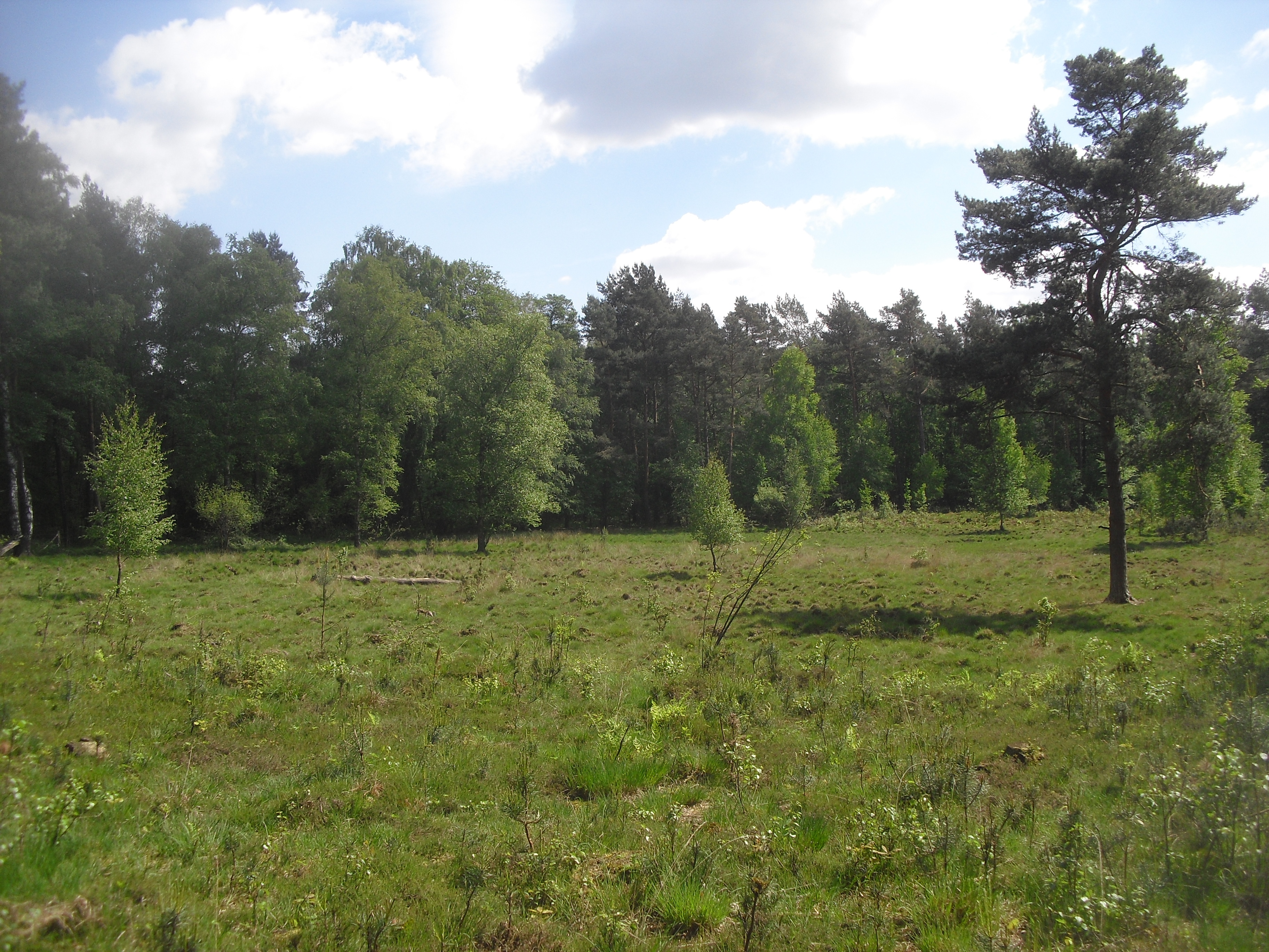 Heidemoor Up`m Piepenbrink in Paderborn-Sande (Naturdenkmal Nr. 01 2.3.3)